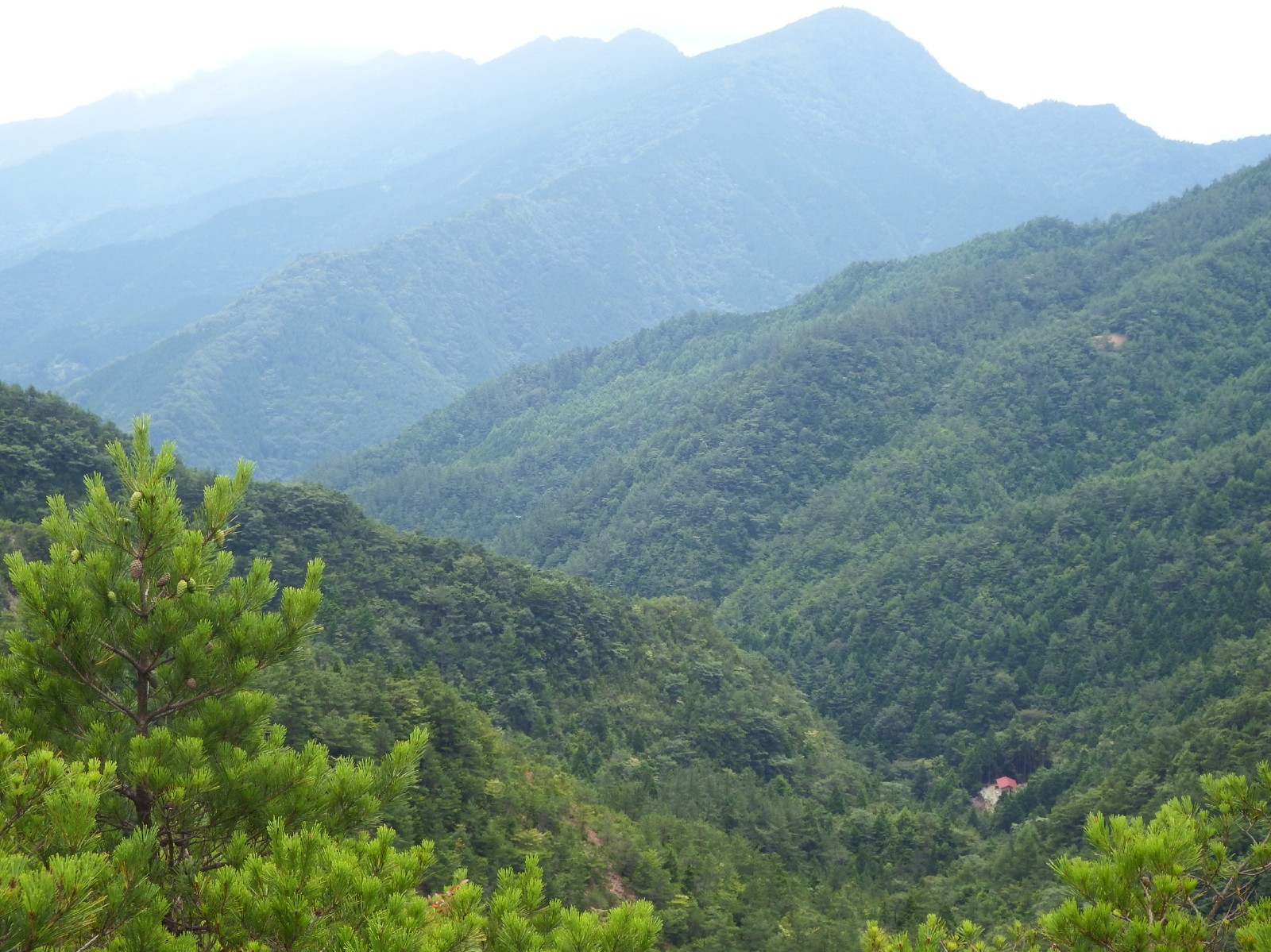 旧別子を延喜の端から見下ろす